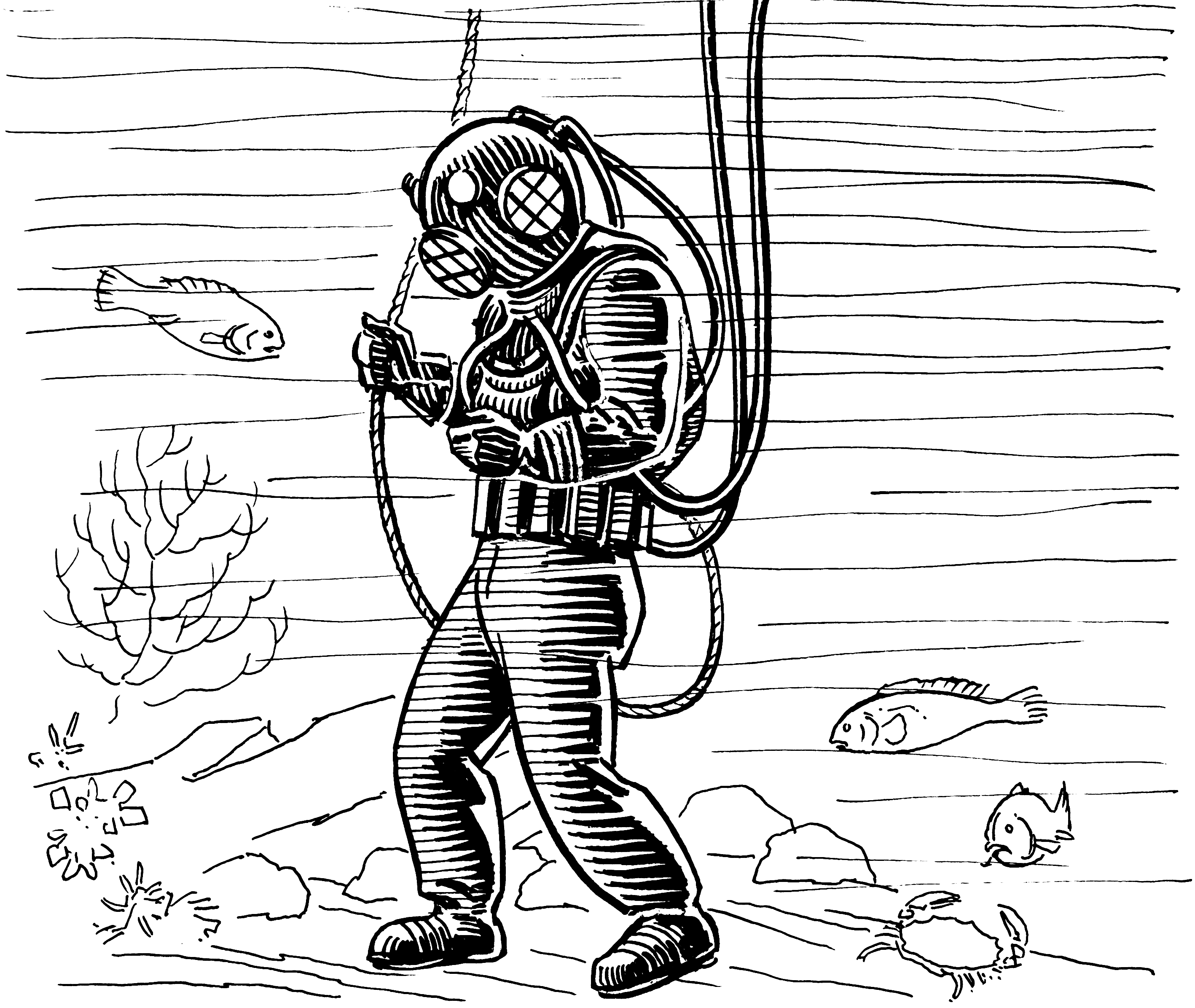 Diver